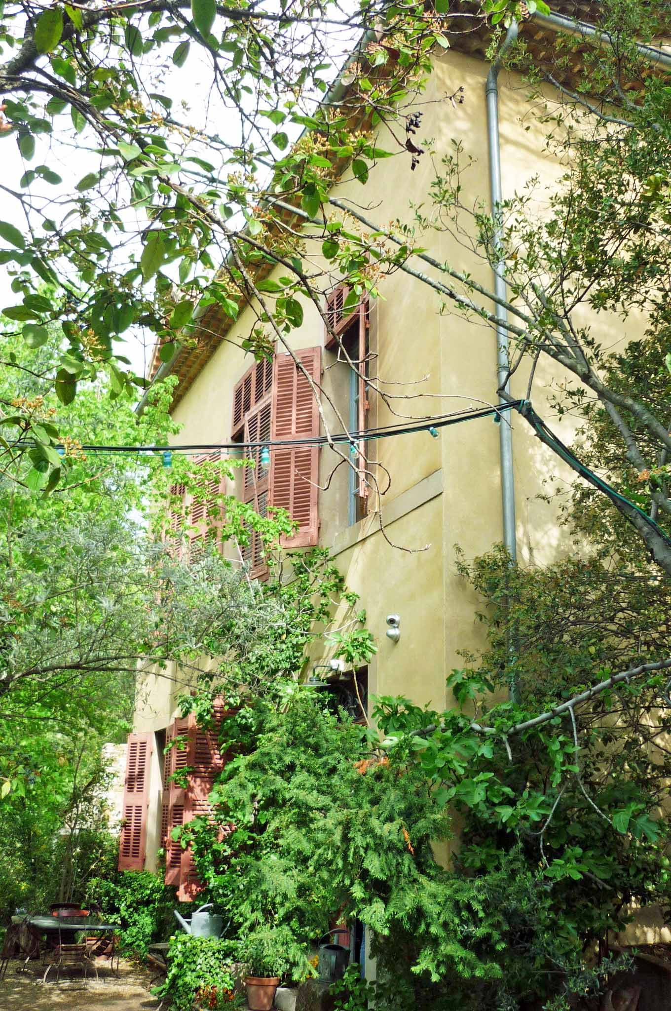 Atelierhaus von Paul Cézanne.